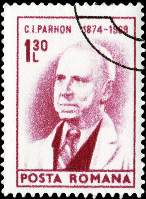 Constantin Ion Parhon (1874–1969), médicin, scientifique et homme politique roumain